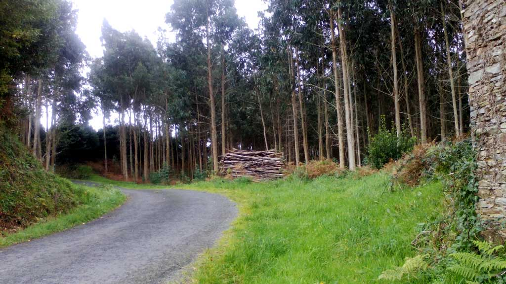 Estrada no castro de Crecente, Valdoviño.